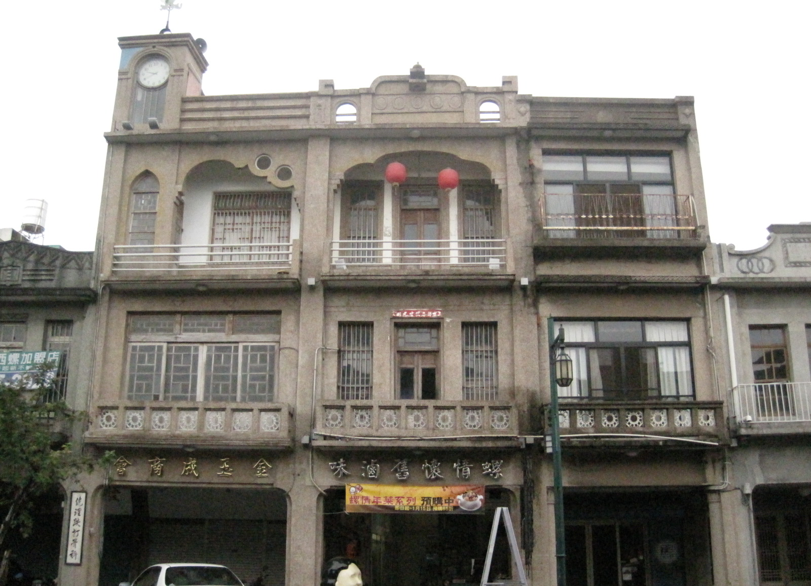 西螺金玉成鐘樓。